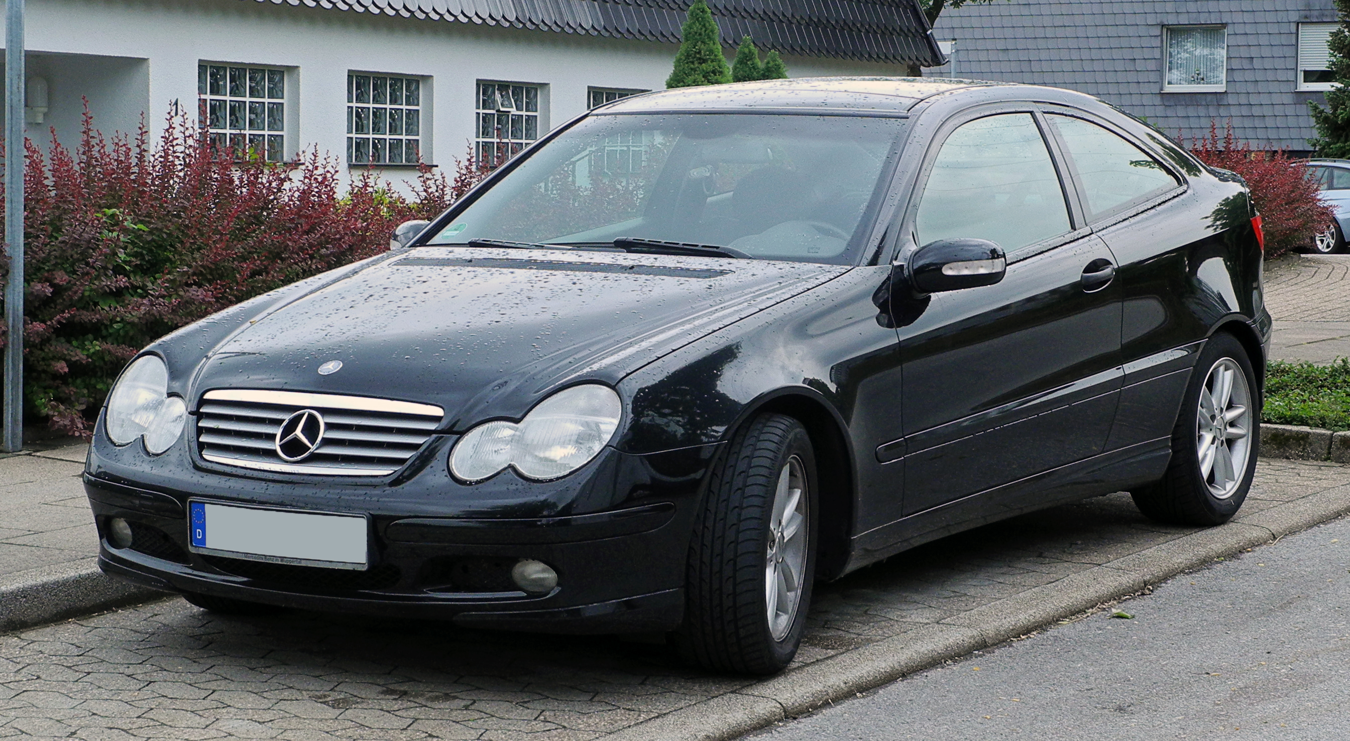 Mercedes-Benz C 230 Kompressor Sportcoupé (CL 203)